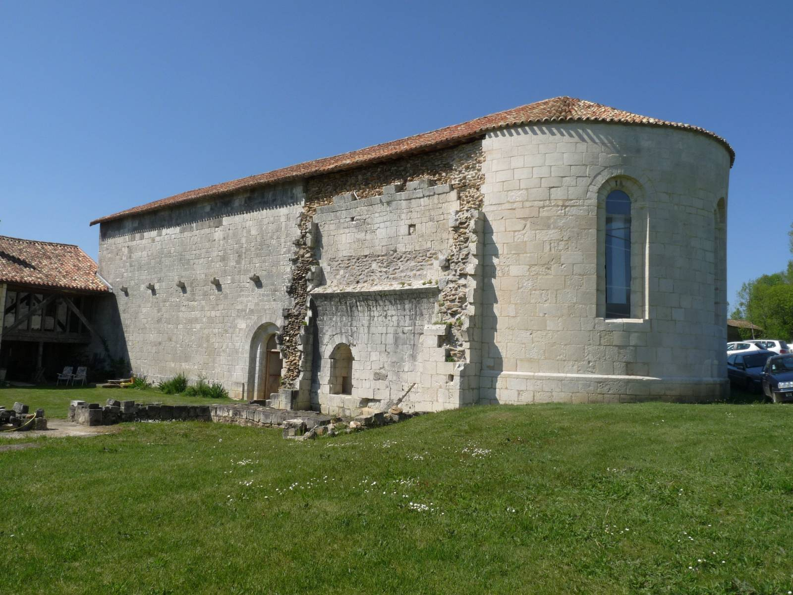 Eglise de Rozet, Combiers, Charente, France